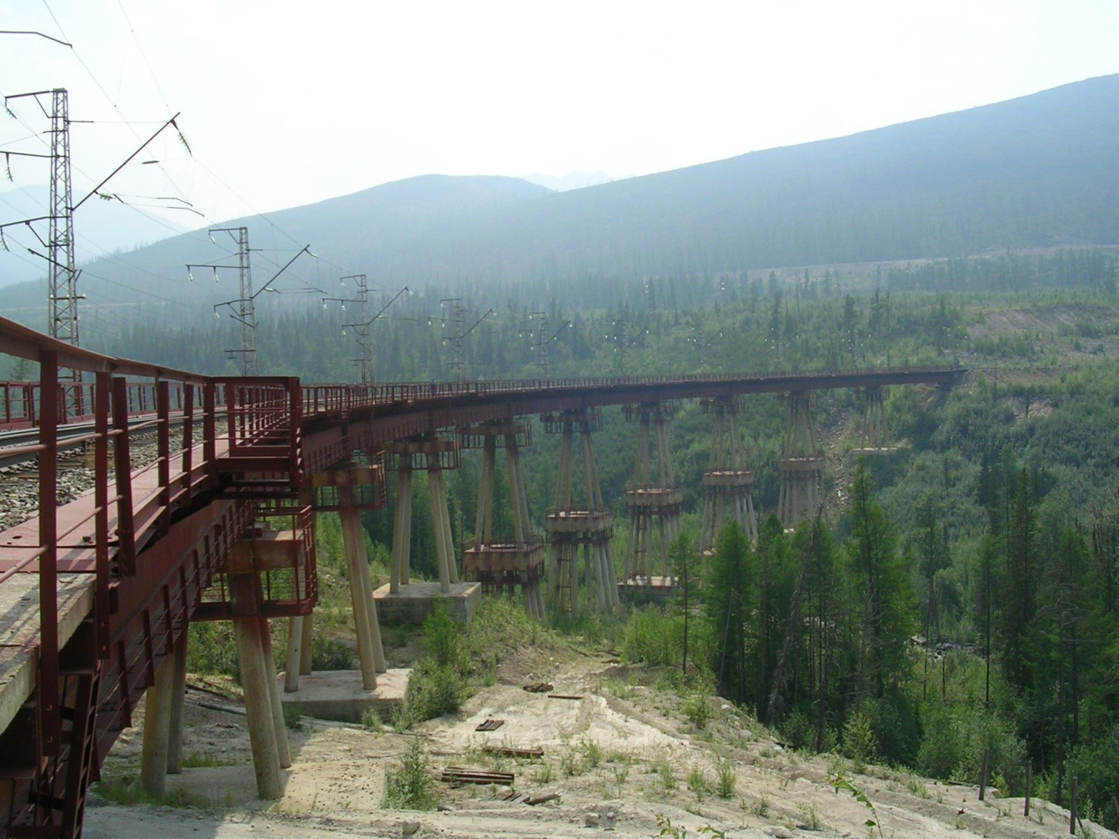 Вид "Чёртового моста" на БАМе